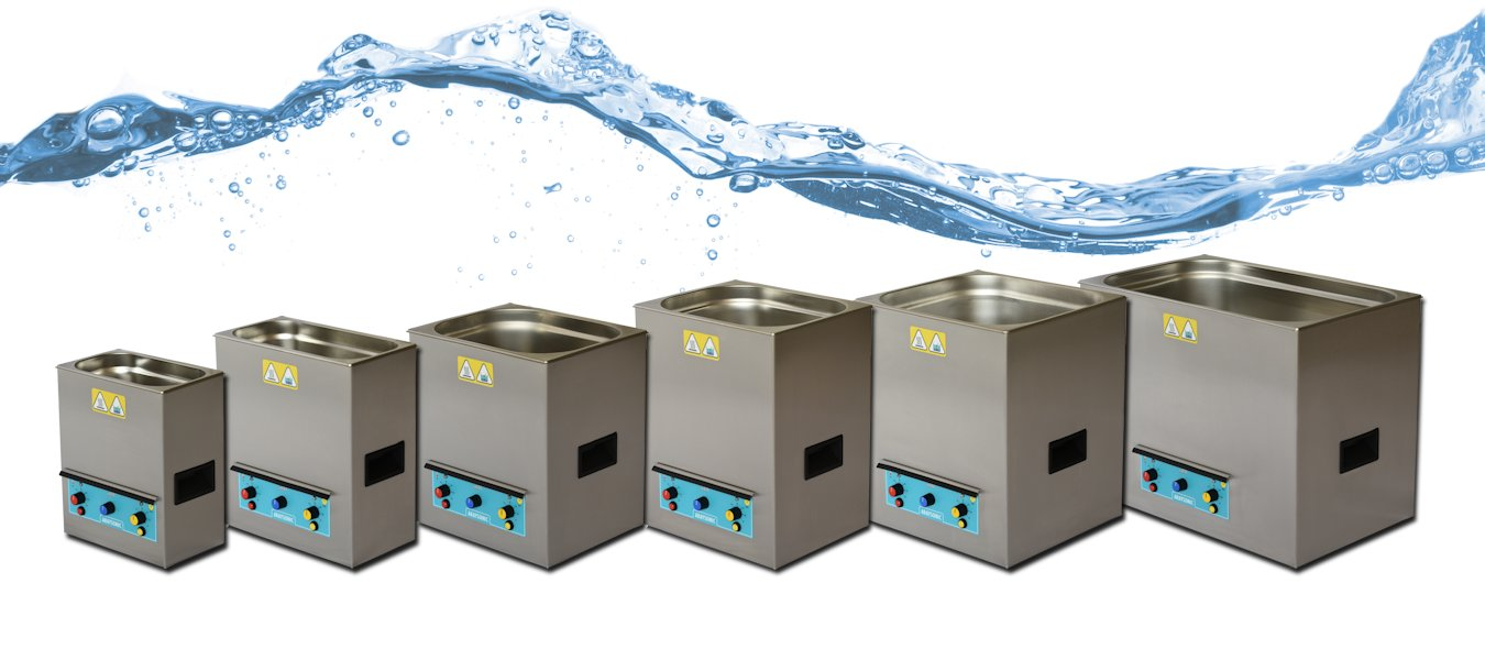 Masaüstü ultrasonik temizleme cihazları